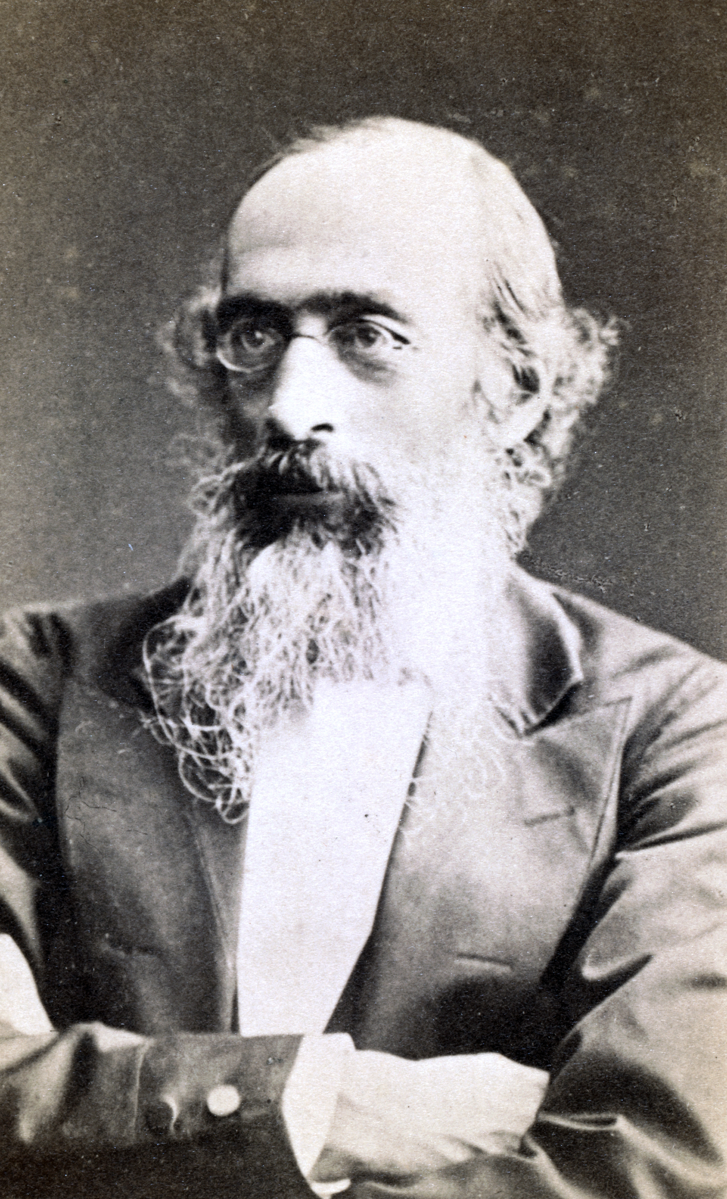 Бестужев-Рюмин, Константин Николаевич